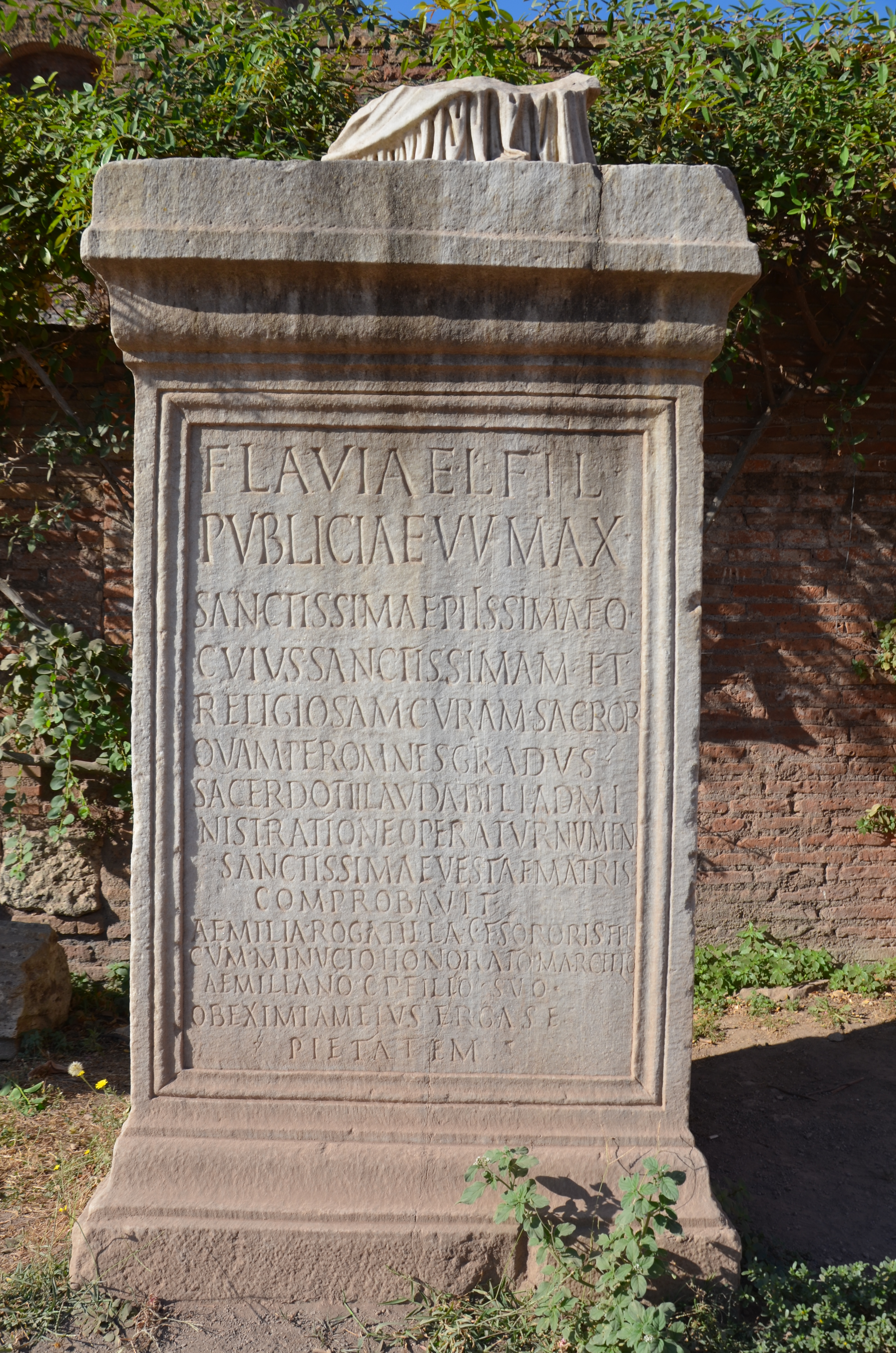 House of the Vestal Virgins (Atrium Vestae), Upper Via Sacra, Rome. CIL VI 32414 = AE 2006, 118. Flaviae L(uci) fil(iae) / Publiciae v(irgini) V(estali) max(imae) / sanctissimae piissimaeq(ue) / cuius sanctissimam et / religiosam curam sacror(um) / quam per omnes gradus / sacerdotii laudabili admi/nistratione operatur numen / sanctissimae Vestae matris / comprobavit / Aemilia Rogatilla c(larissima) f(emina) sororis fil(ia) / cum Minucio Honorato Marcello / Aemiliano c(larissimo) p(uero) filio suo / ob eximiam eius erga se / pietatem // Col(locata) V Id(us) Iul(ias) / dd(ominis) nn(ostris) Imp(eratore) Philippo Aug(usto) II et / Philippo Caes(are) co(n)s(ulibus)